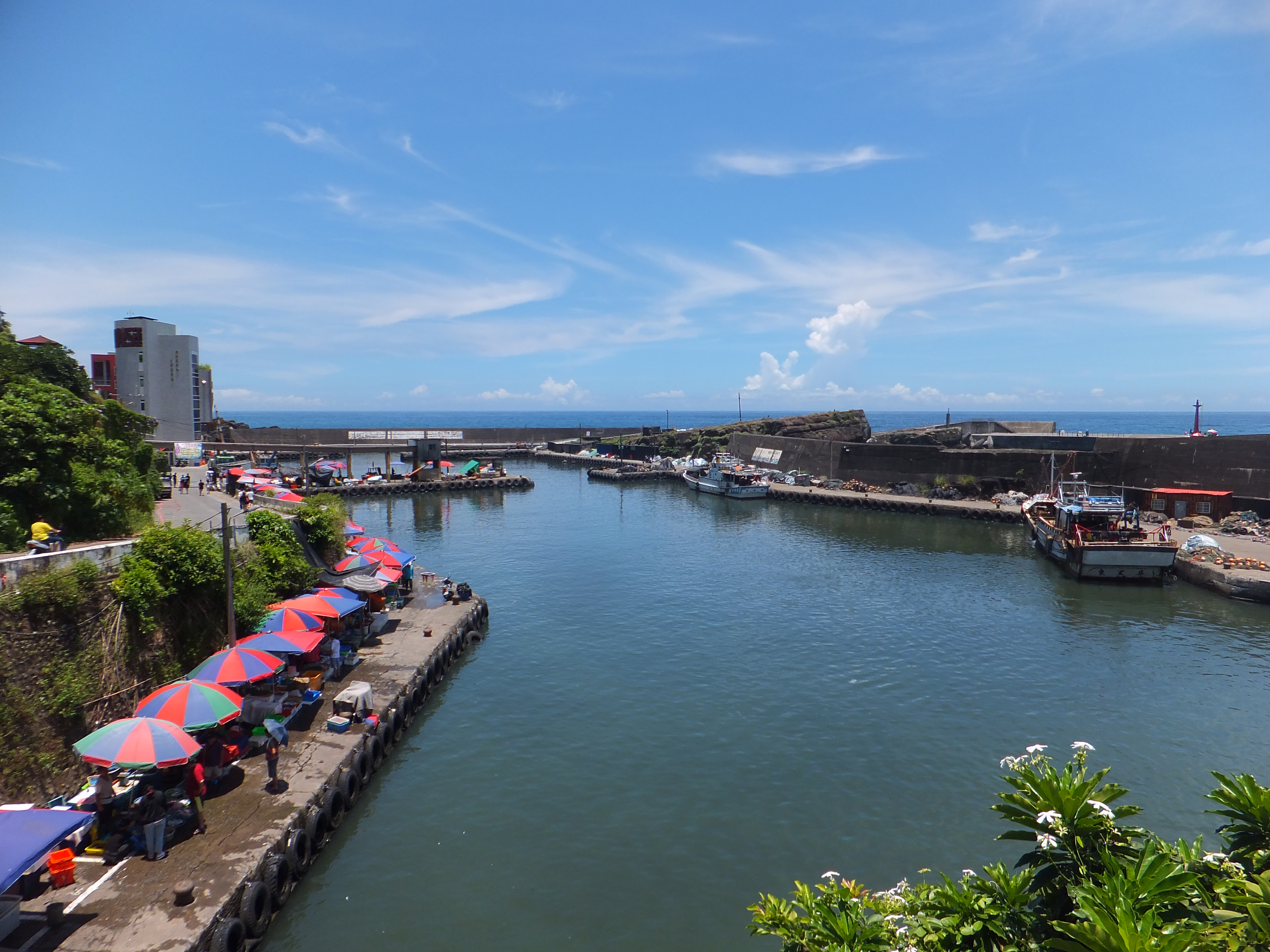 中文（台灣）: 大溪漁港一景